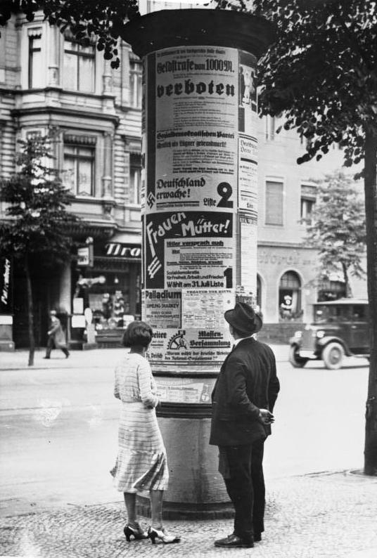 Wahlplakate an einer Litfaßsäule, Berlin